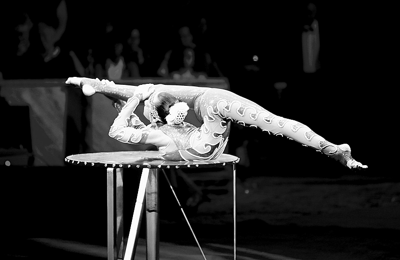 32nd International du Cirque de Monte-Carlo, Jan 2008